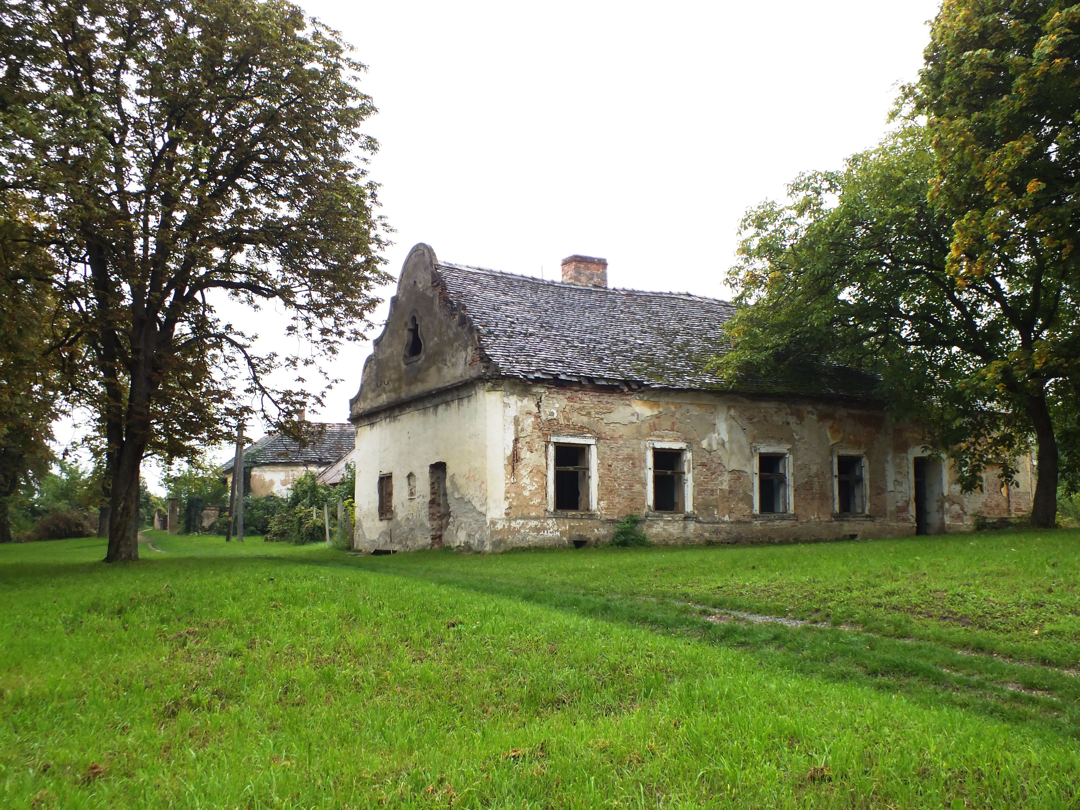 Szegedy-kastély és kúria This is a photo of a monument in Hungary. Identifier: 9827